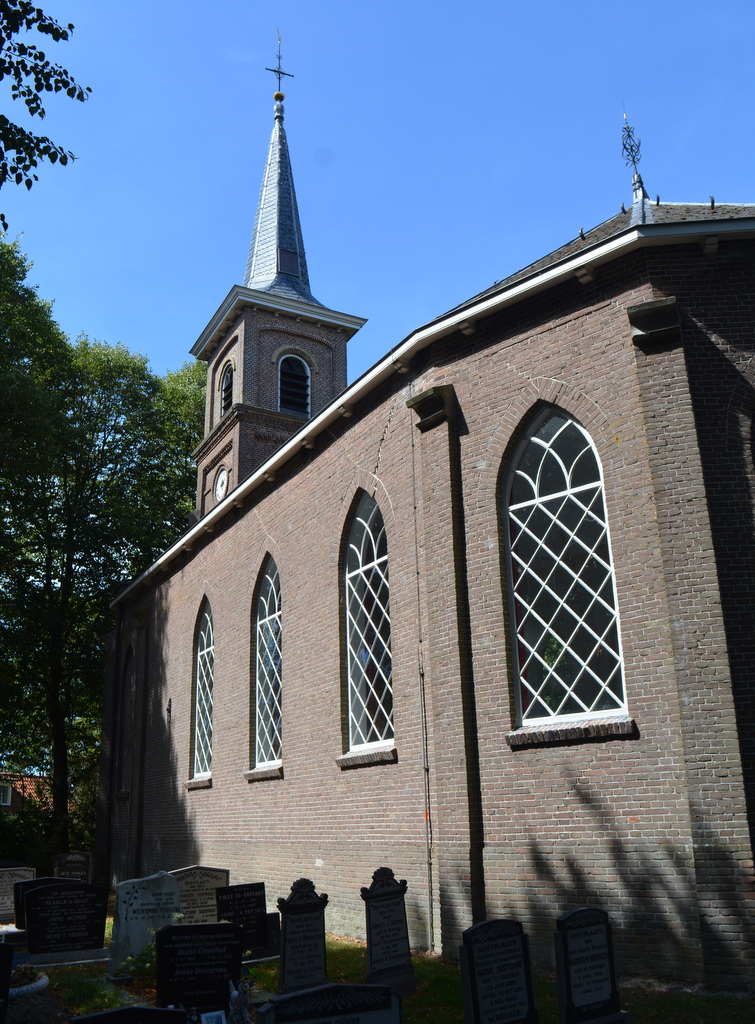 Skingen, Stevenstsjerke